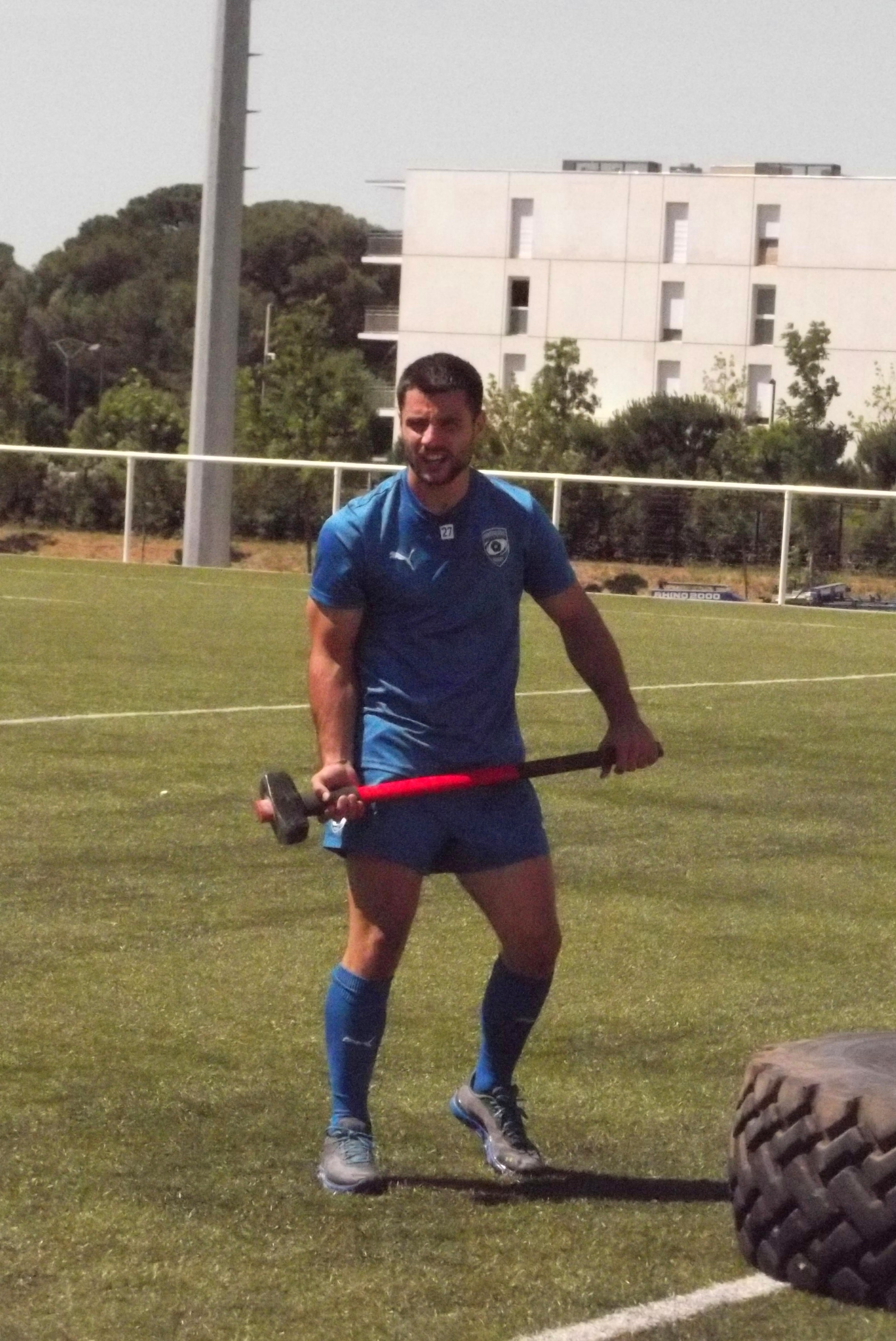 Jonathan Pélissié en juin 2013.